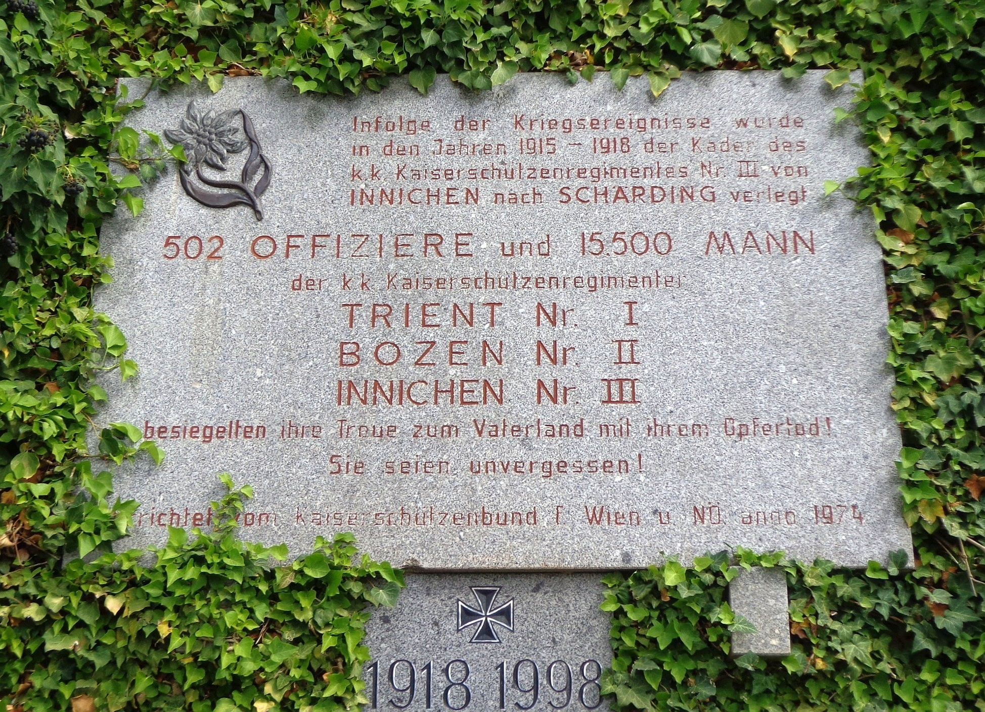 Schärding, Schlosspark - Hessen-Rainer-Platz - Kriegergedenkstätte mit Denkmal für die Tiroler Landesschützenregimenter I, II, III.